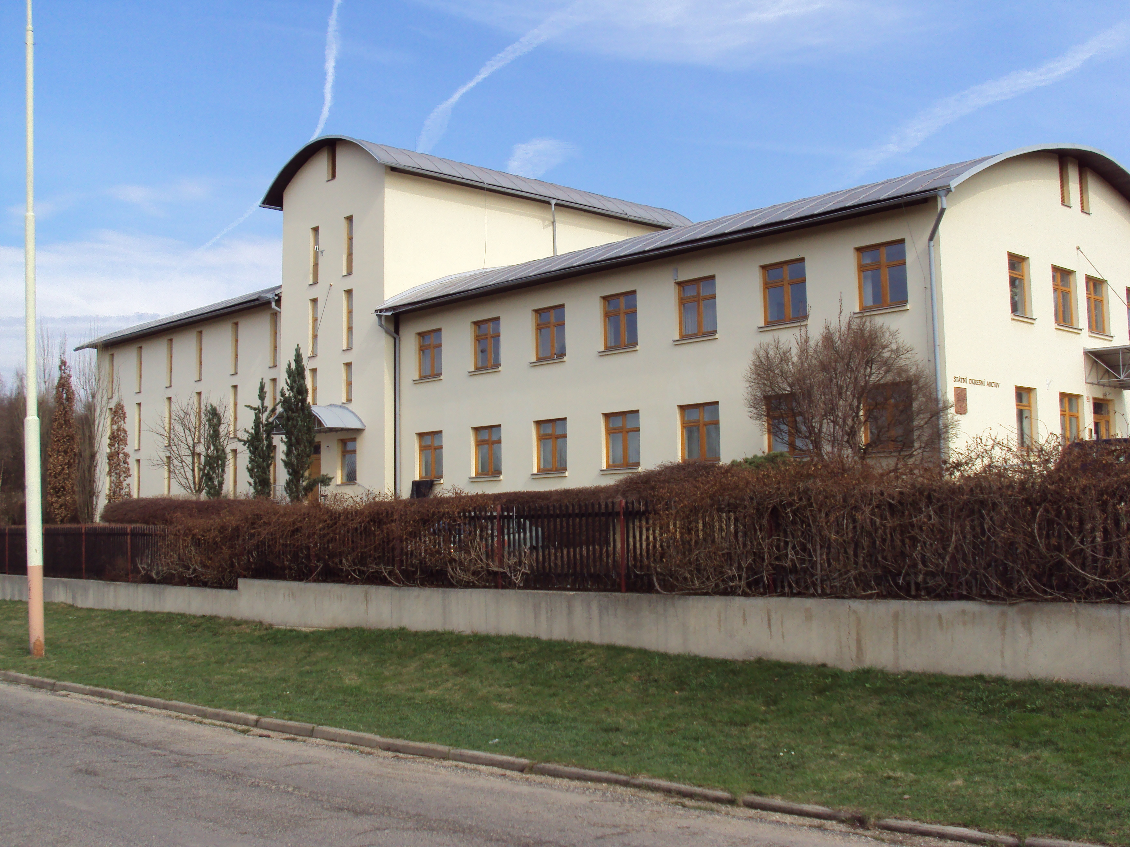 Okresní archiv Česká Lípa, čtvrť Střelnice